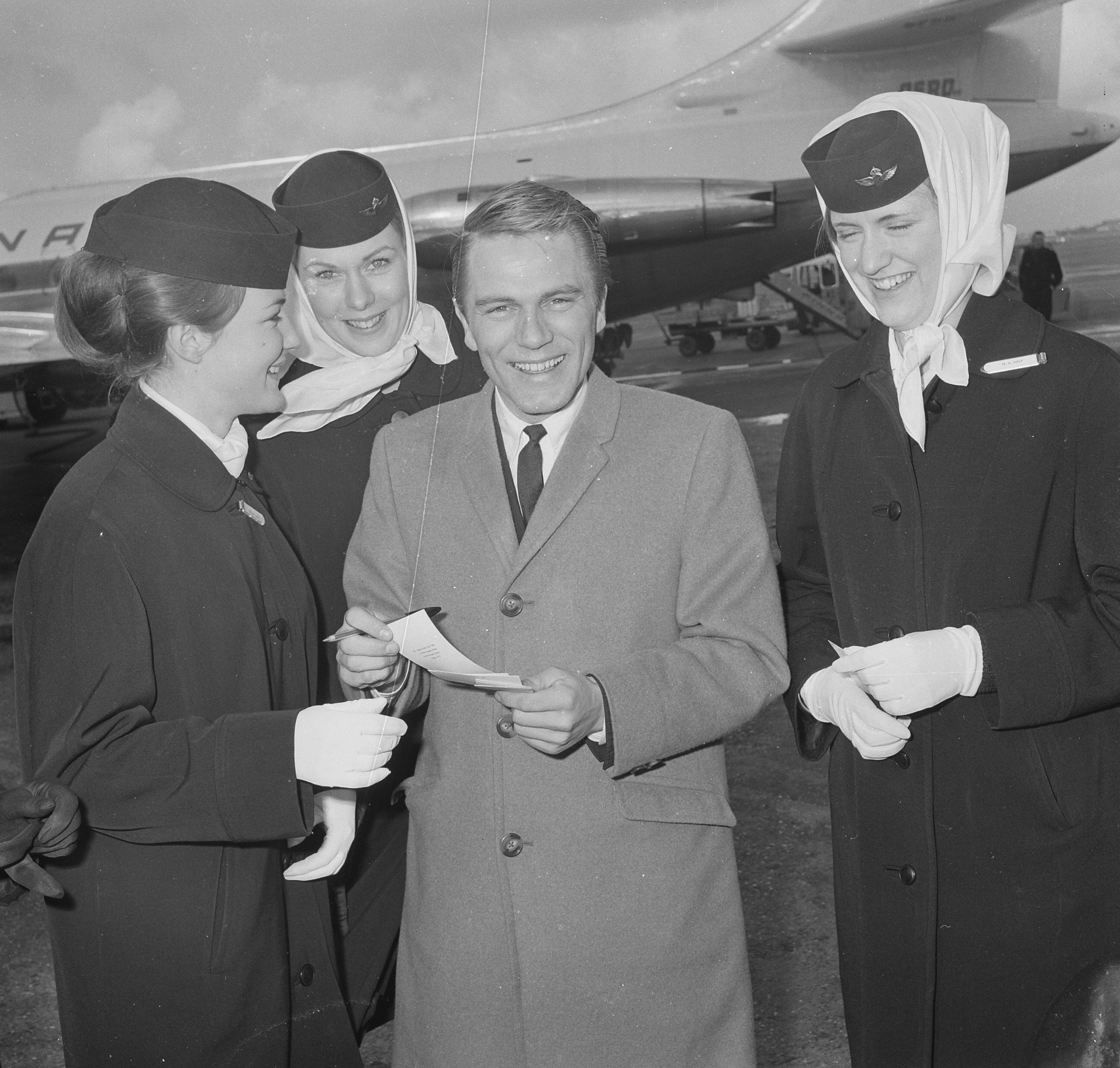 Collectie / Archief : Fotocollectie Anefo Reportage / Serie : [ onbekend ] Beschrijving : Adam Faith op Schiphol voor optreden Rudy Carrellshow Datum : 4 april 1963 Locatie : Noord-Holland, Schiphol Trefwoorden : stewardessen Fotograaf : Nijs, Jac. de / Anefo Auteursrechthebbende : Nationaal Archief Materiaalsoort : Negatief (zwart/wit) Nummer archiefinventaris : bekijk toegang 2.24.01.03 Bestanddeelnummer : 915-0057